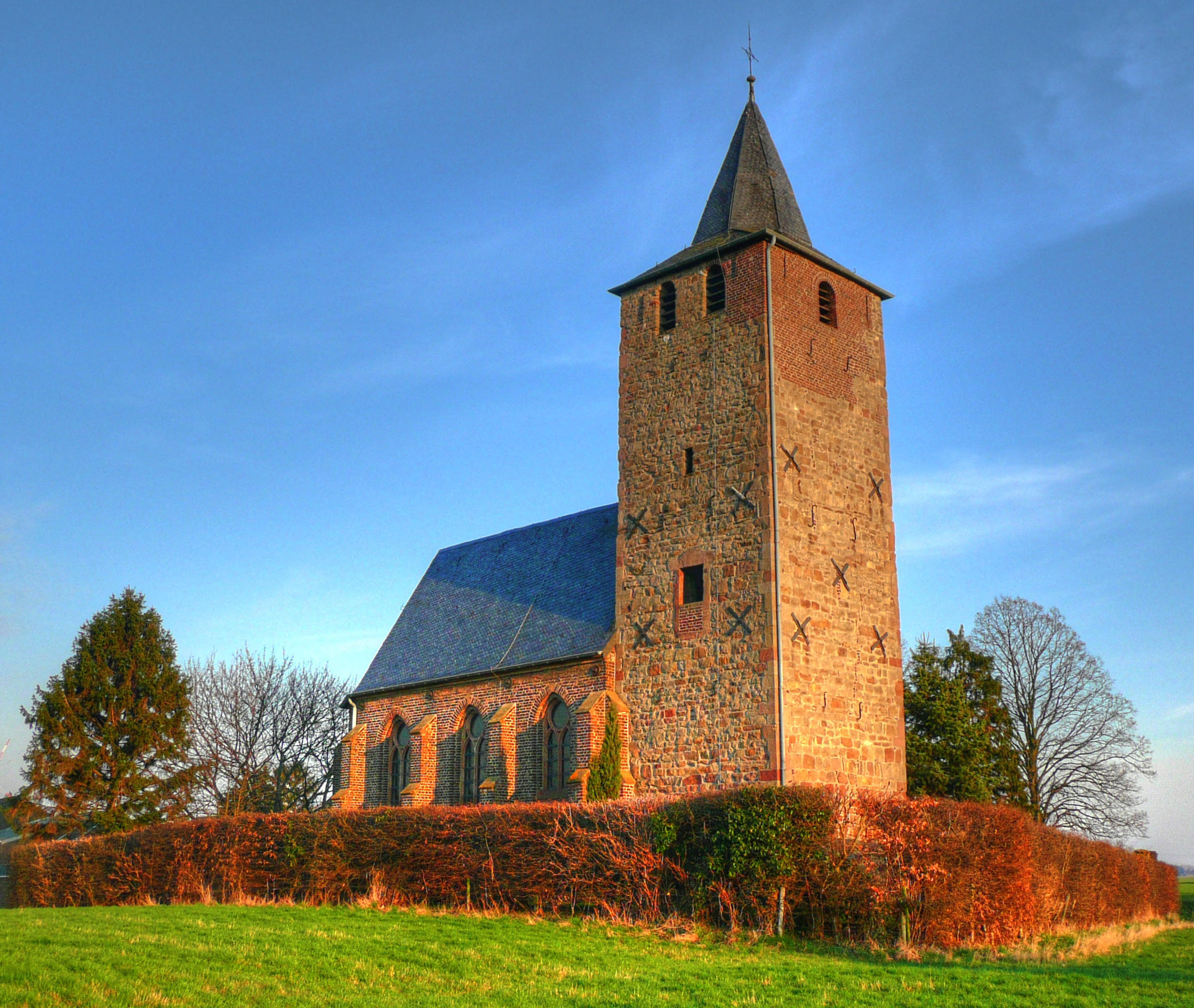 Das Ühledömche aus nordwestlicher Richtung